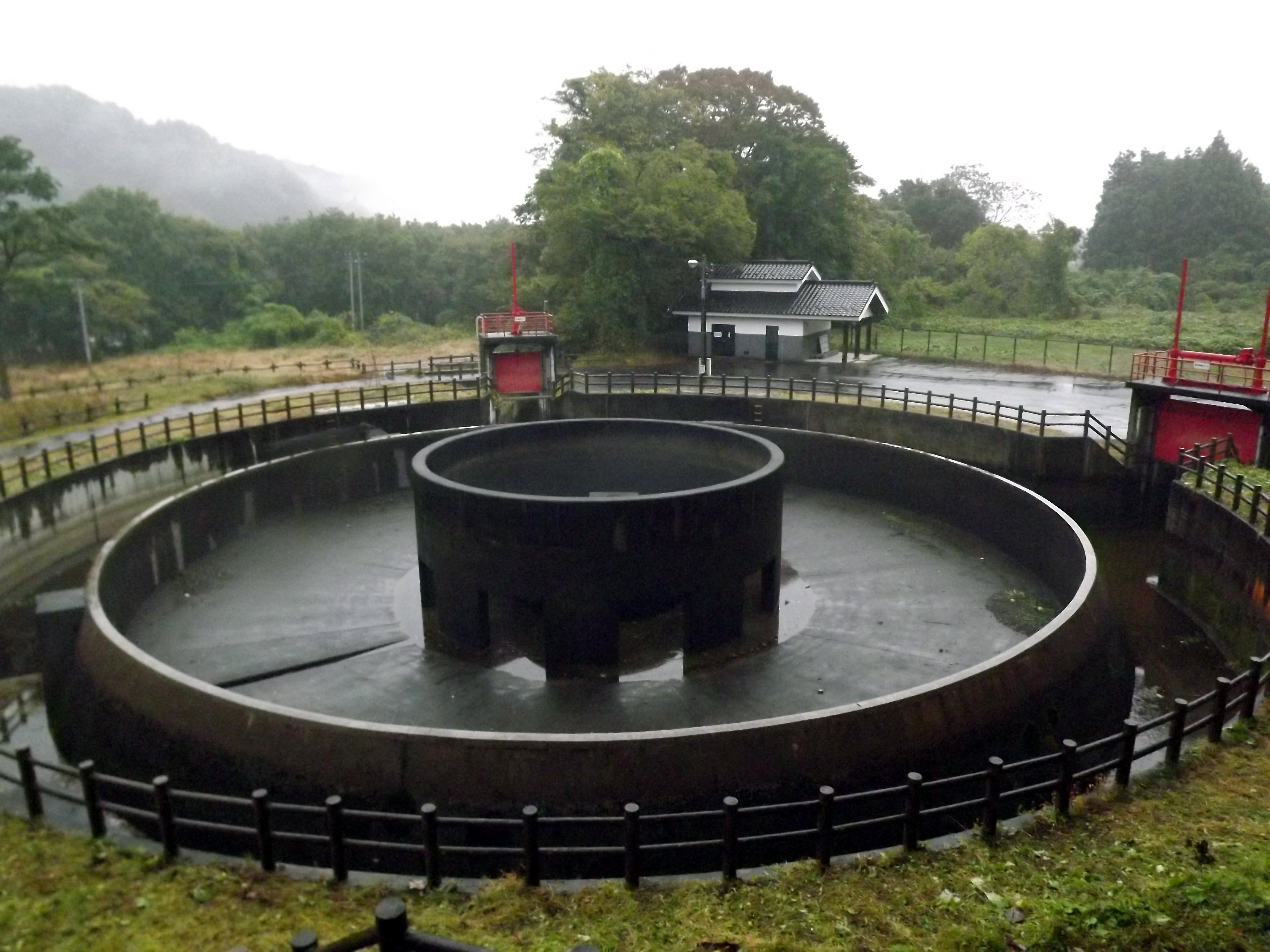 円筒分水工（岩手県奥州市胆沢区）